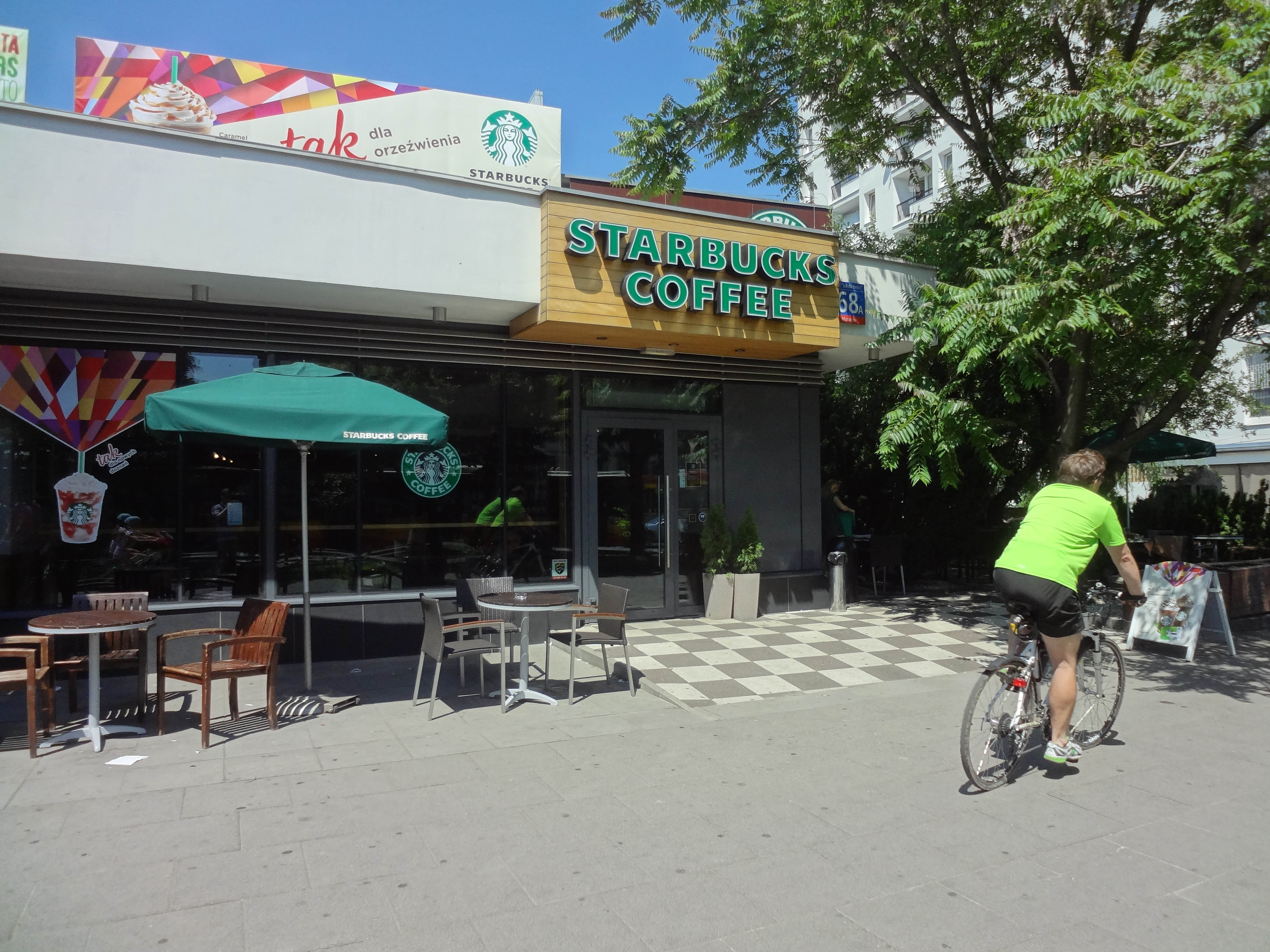 Kawiarnia Starbucks w Warszawie